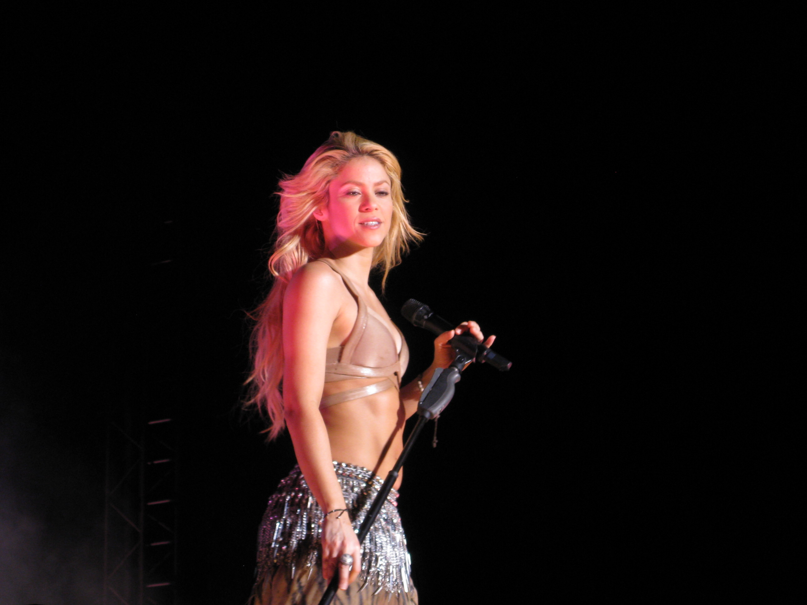 Shakira 2011 am Seerock Festival am Schwarzlsee (Graz) im Rahmen ihrer "The Sun Comes Out"-Tour